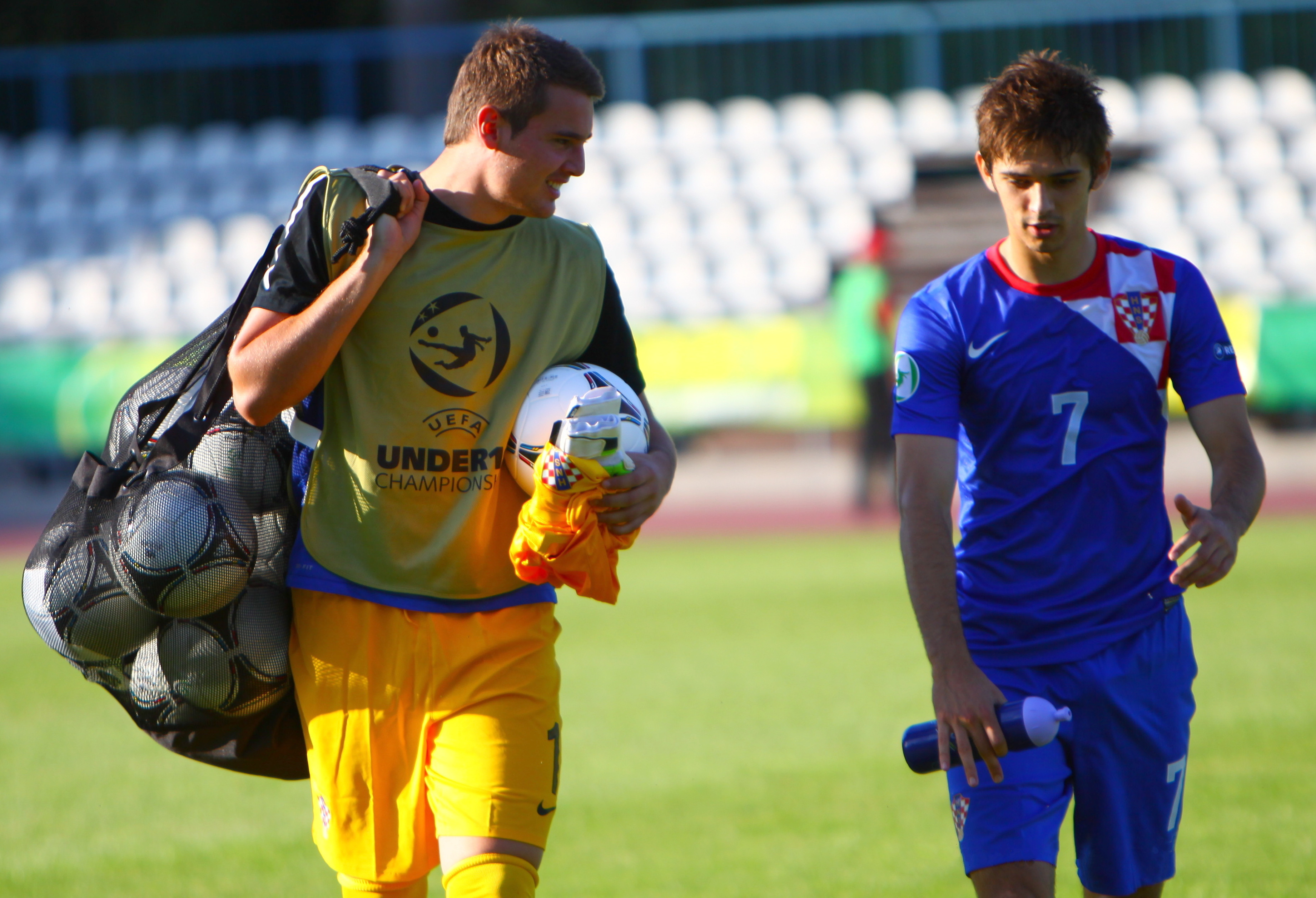 Oliver Zelenika and Marko Pajač.